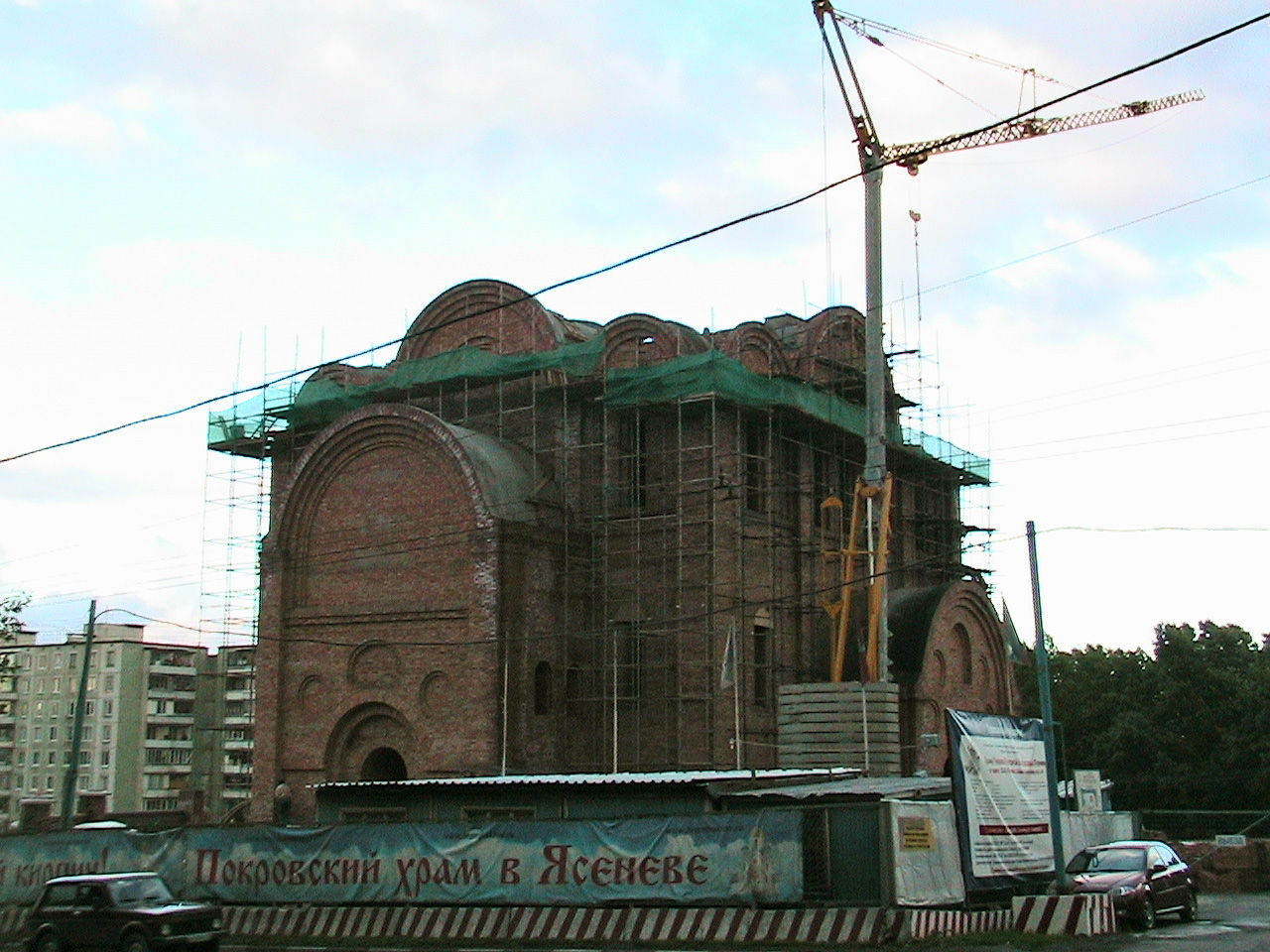 Храм Покрова Пресвятой Богородицы в Ясеневе. 17 июня 2010